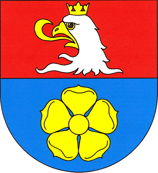 Znak obce Polště